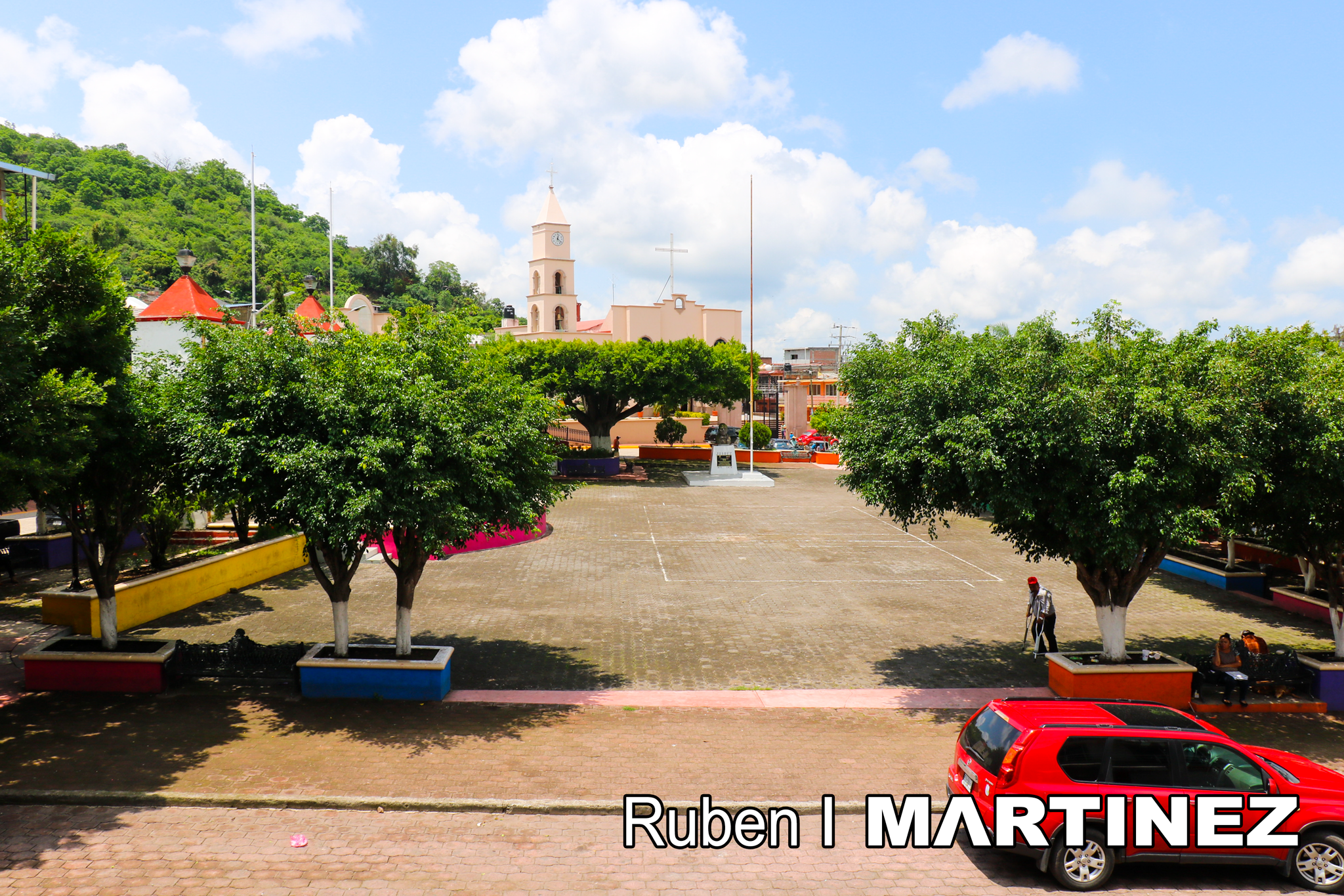 Paza Cívica "Lic. Benito Juárez García vista desde la Presidencia